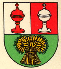 Wappen von Vuarrens Kanton Waadt Schweiz